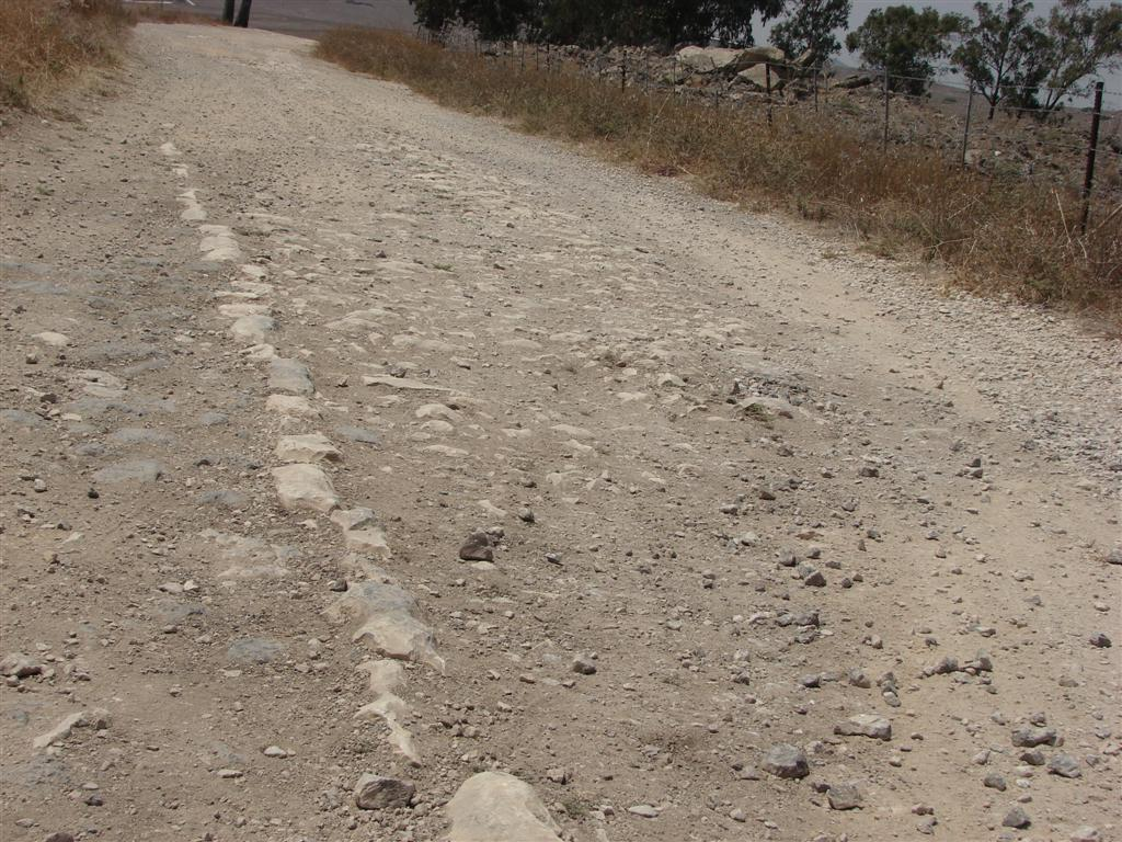 דרך סולינג לייד קרני חיטין